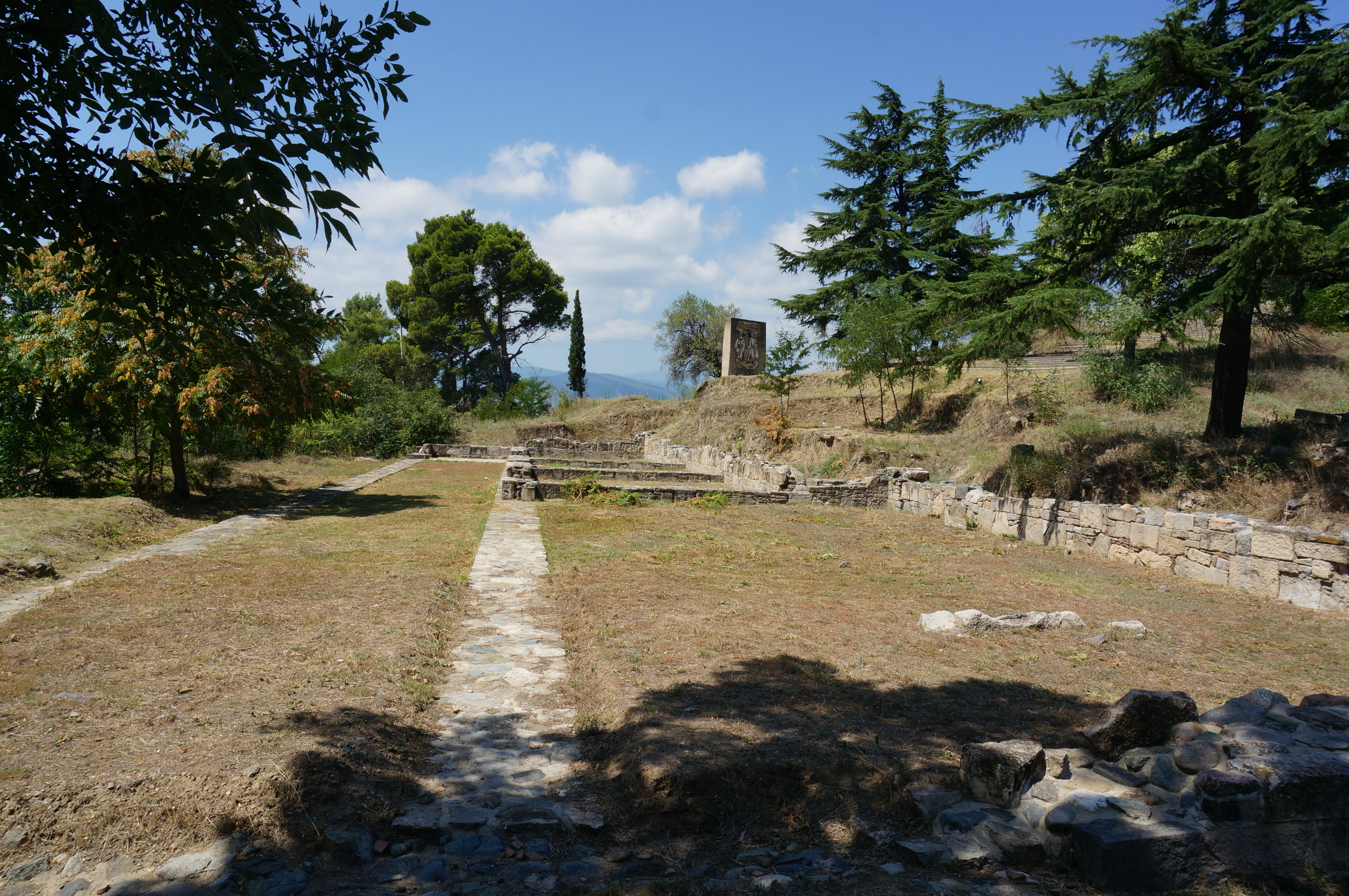 le museum Evgueli.